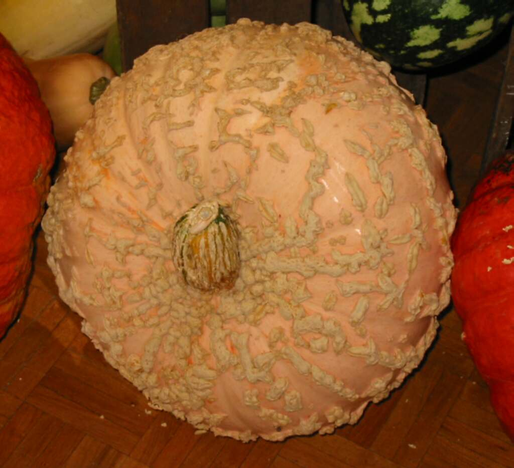 Courge galeuse d'Eysines (Cucurbita maxima) Photo JH Mora, septembre 2005